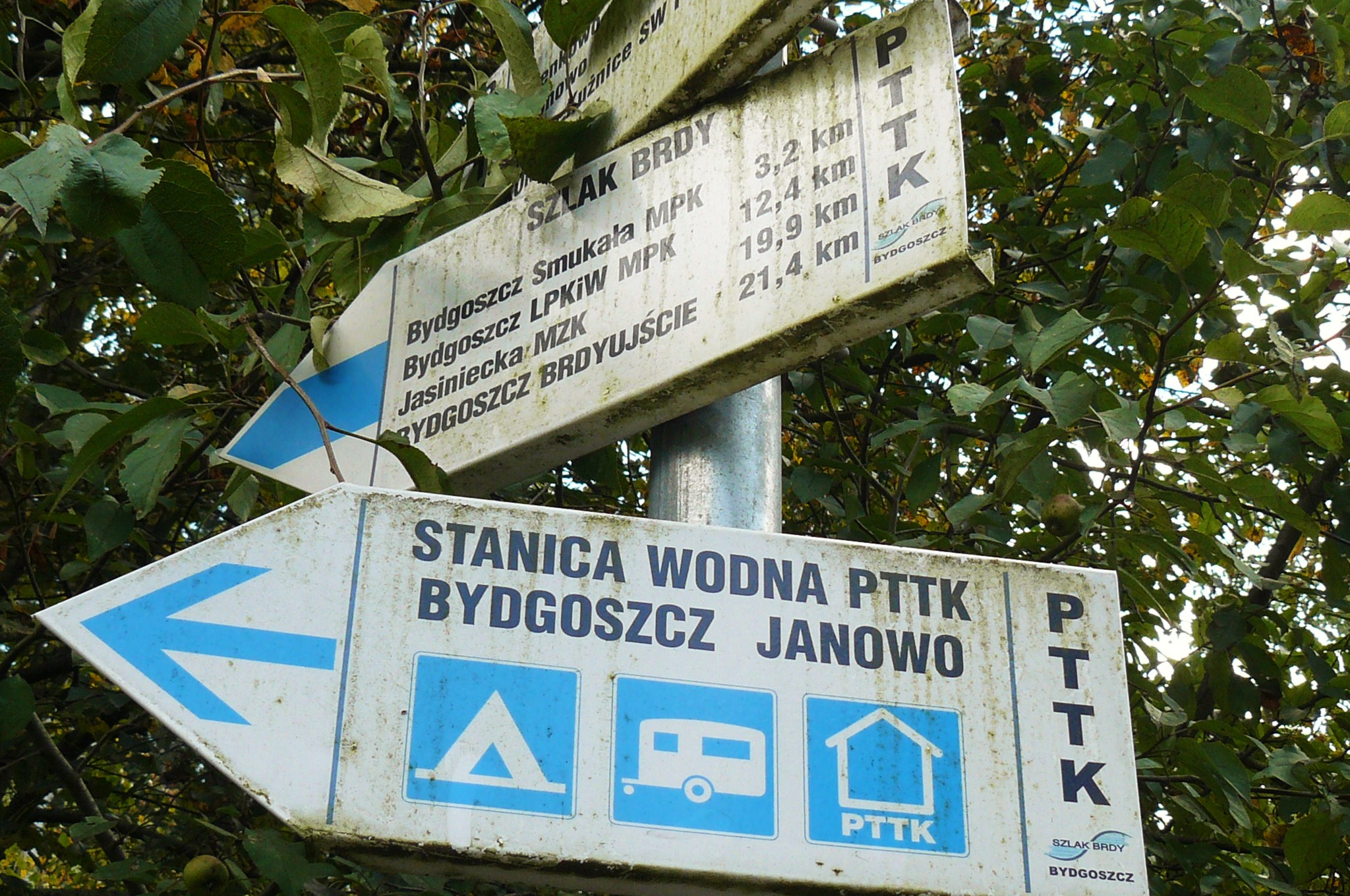 Szlaki turystyczne Opławca i Smukały - Bydgoszcz.